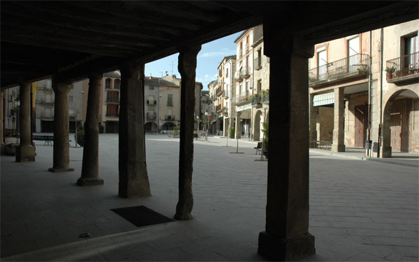 Santa Coloma de Queralt (Conca de Barberà). La Plaça Major